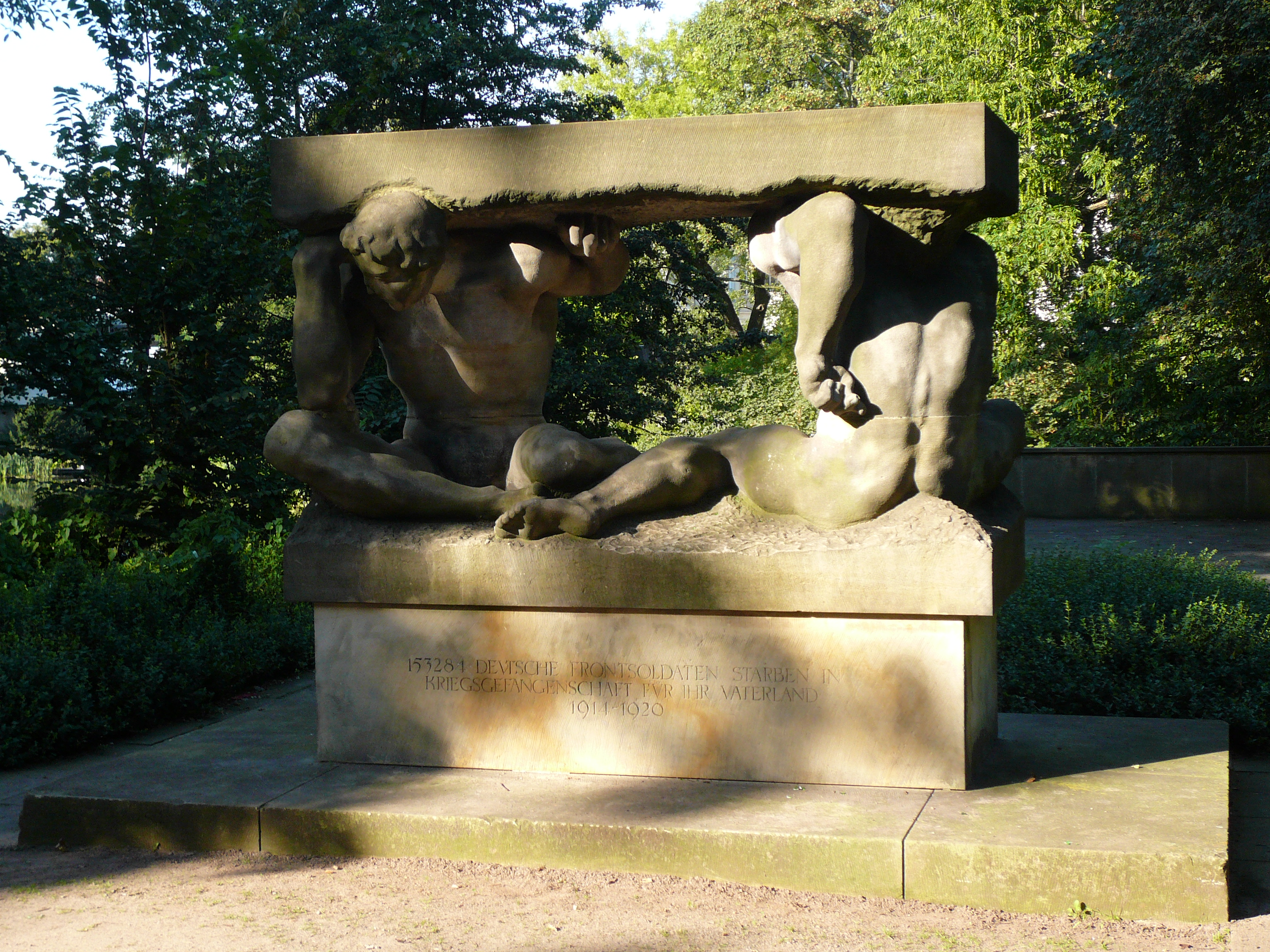 Das Kriegsgefangenen-Ehrenmal in Bremen. Inschrift: 153281 Deutsche Frontsoldaten starben in Kriegsgefangenschaft für ihr Vaterland 1911-1920 Das abgebildete Objekt ist ein geschütztes Kulturdenkmal in der Freien Hansestadt Bremen, mit der Nr. 1193,T010 beim Landesamt für Denkmalpflege registriert.